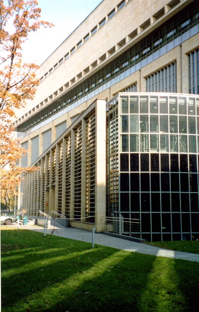 Neuer Anbau der Jagiellonen-Bibliothek, Krakau